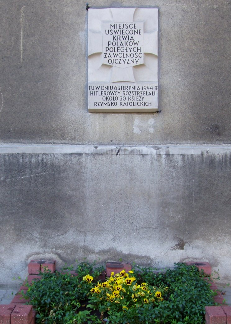 Przy ul. Karolkowej 49 na warszawskiej Woli (fot Zu)